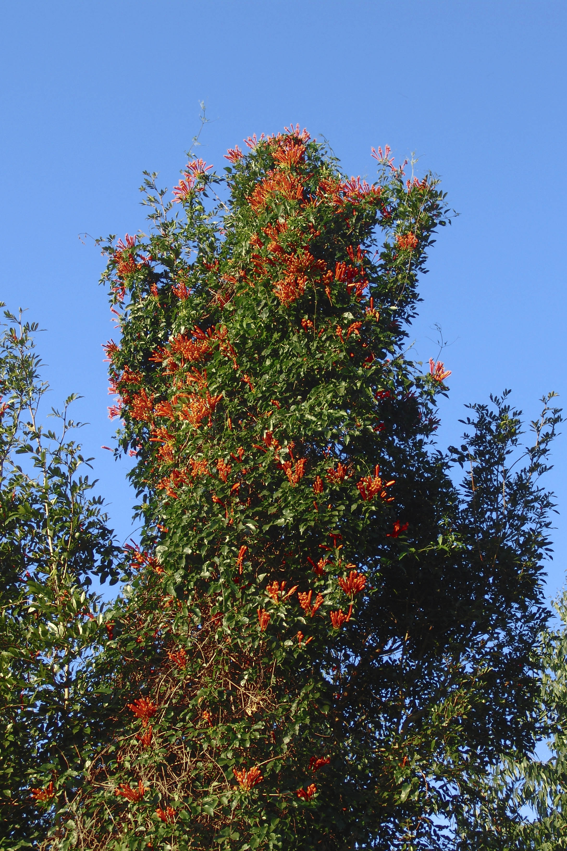 flor de São João, (Pyrostegia venusta) ou: cipó-de-são-joão, cipó-bela-flor, marquesa-de-belas, cipó-pé-de-lagartixa, cipó-de-lagarto - florece mais ou menos de maio e vai até setembro